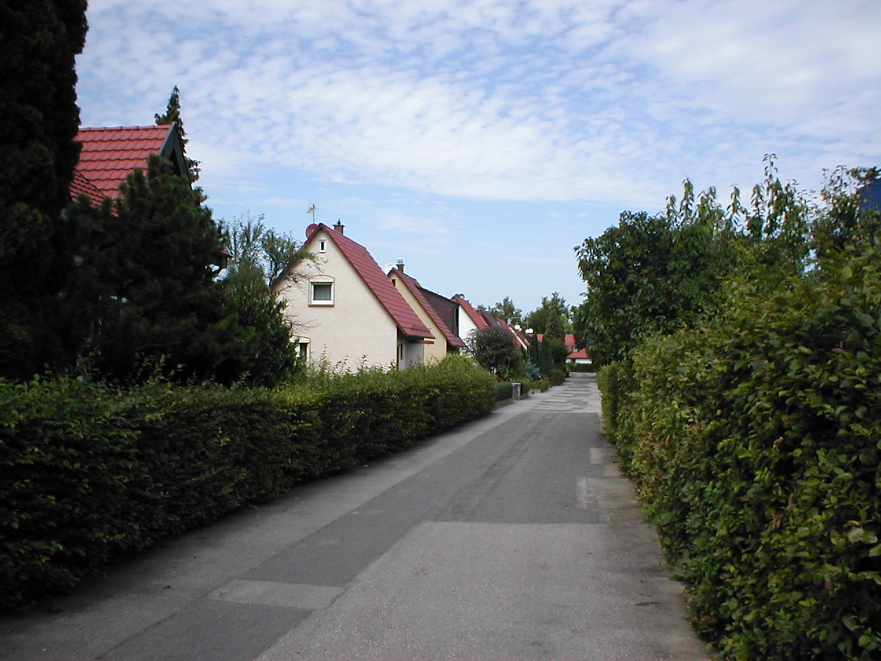 Kreuzgrund, Heilbronn-Böckingen. Selbstversorgersiedlung 1937 mit Häusern des Typs "Volkswohnhaus Ensle".